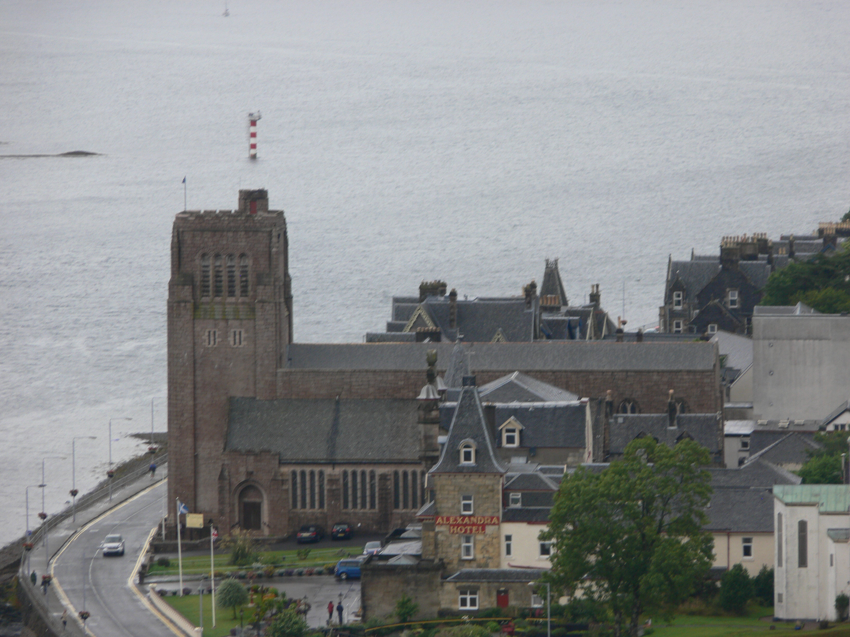 Cathédrale catholique St Columba d'Oban